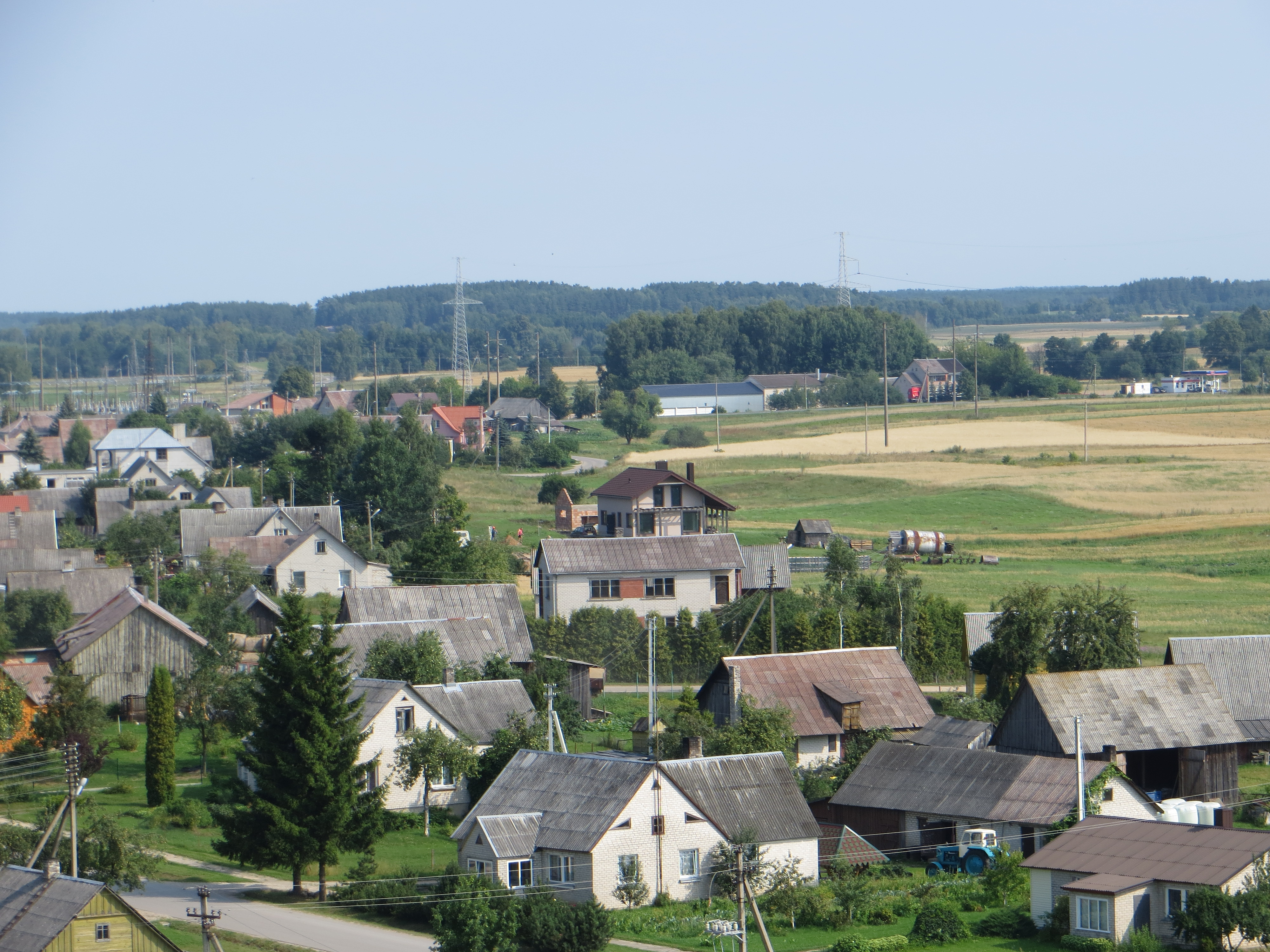 Leipalingio sen., Lithuania